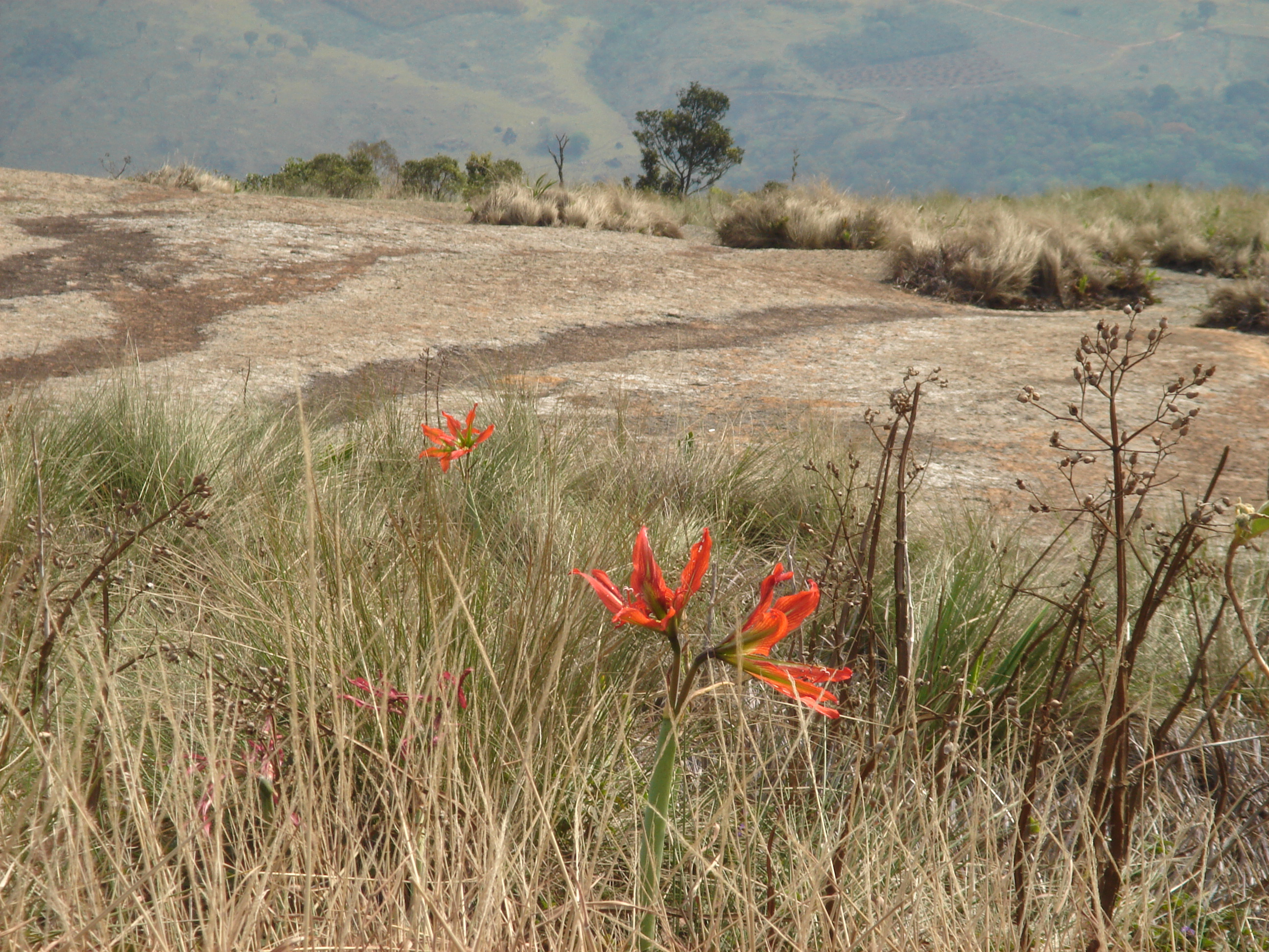 Pedra Grande, Atibaia